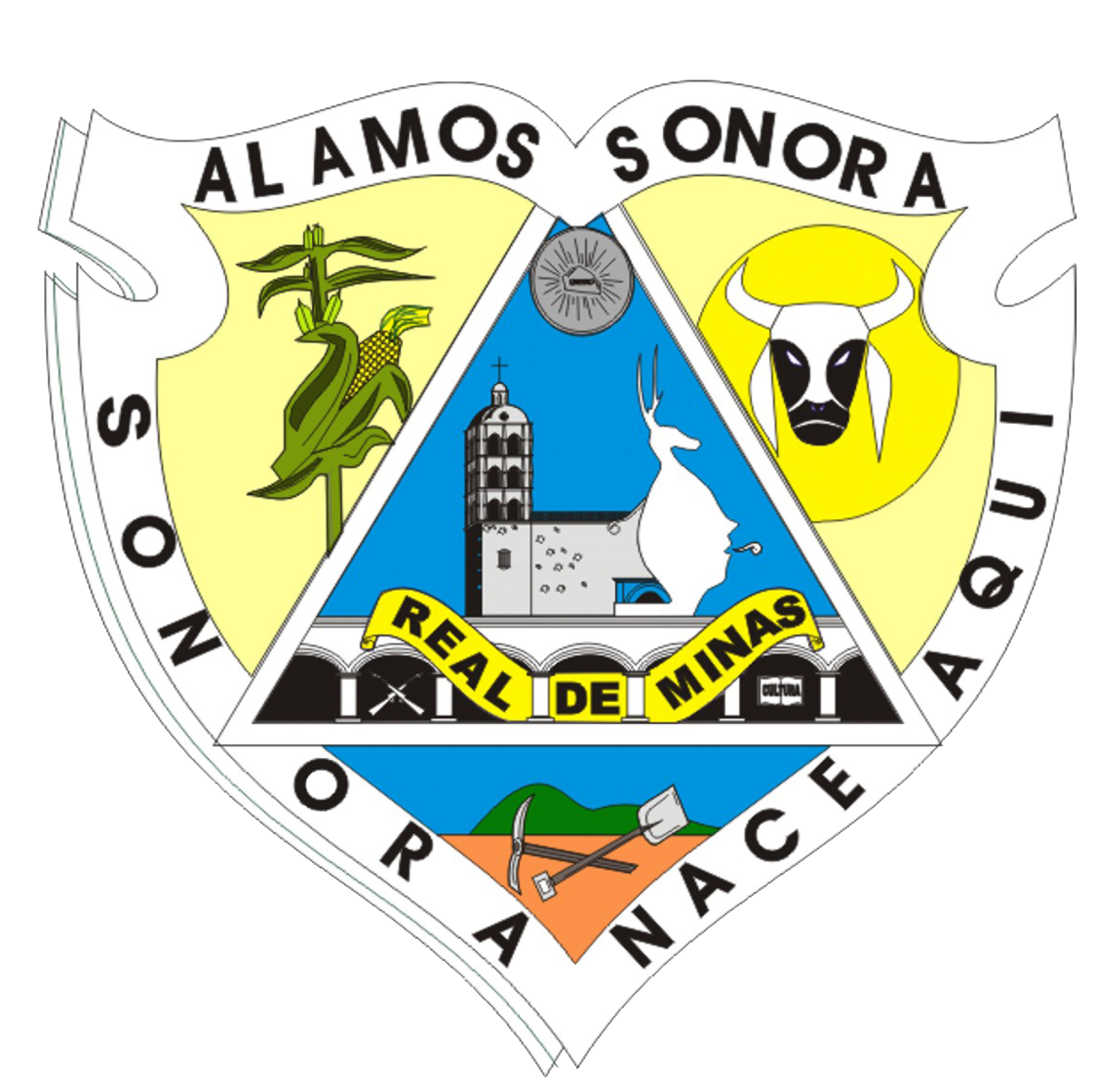 Escudo del municipio sonorense.